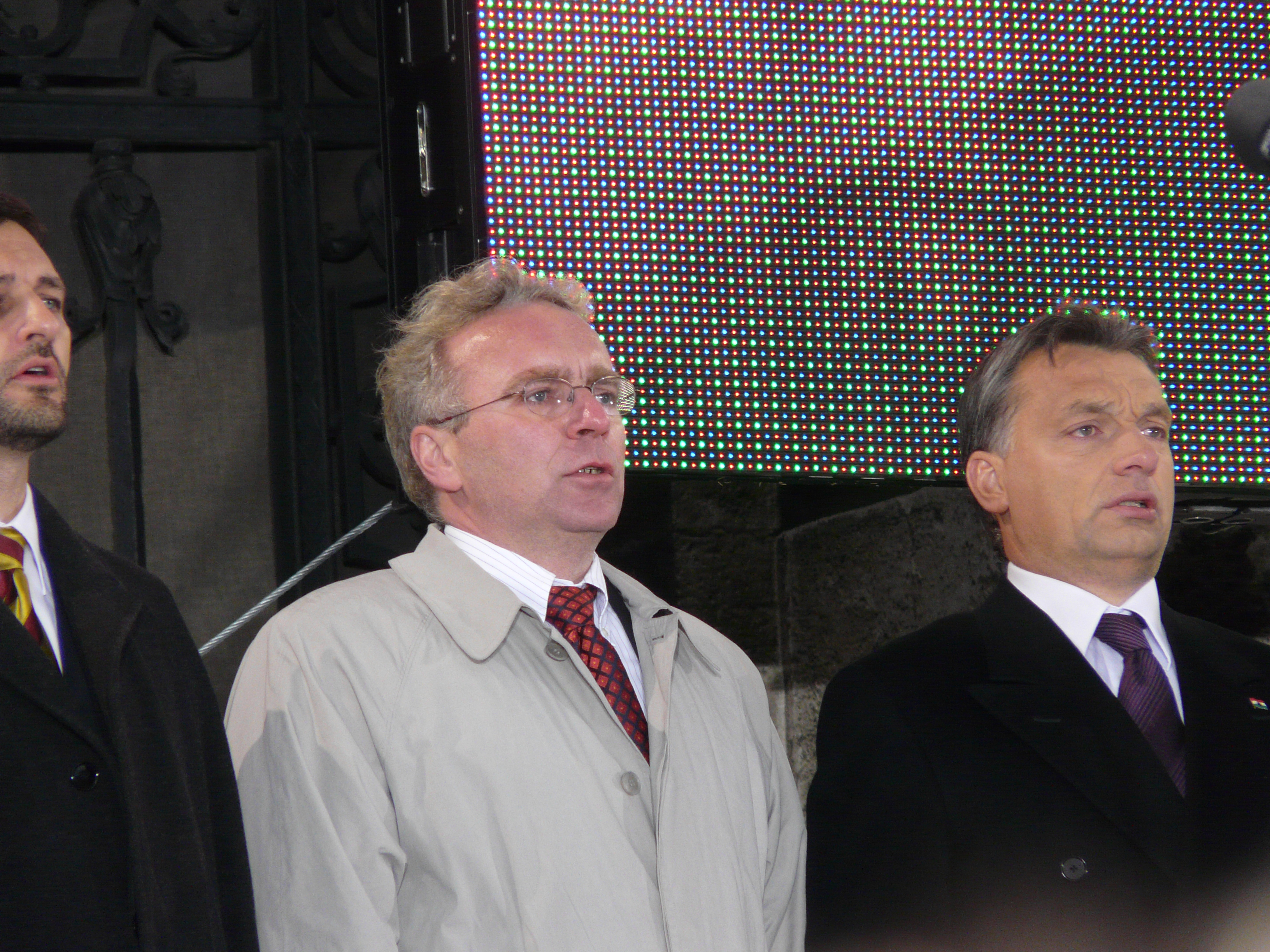 A felvétel 2008 október 23 -án, csütörtökön készült. A FIDESZ Magyar Polgári Párt Budapesten, a Várnegyedben, a Dísz téren tartotta megemlékezését. Orbán Viktor, Pokorni Zoltán. A felvétel megjelent Creative Commons alatt a Metapolisz DVD sorozatban. A kép bal szélén Nagy Gábor Tamás, I. kerületi polgármester.